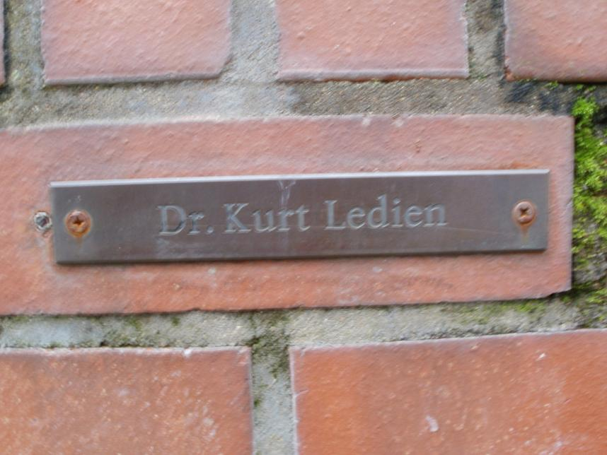 Namensschild aus Bronze mit der Aufschrift Dr. Kurt Ledien an einem gemauerten Stuhl der Gedenkstätte für 11 Widerstandskämpfer in Hamburg-Niendorf.